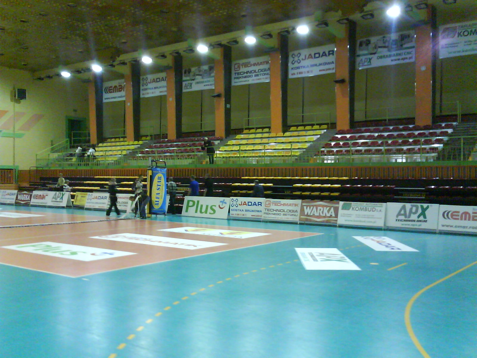 Hala MOSiR w Radomiu; Hall MOSiR in Radom